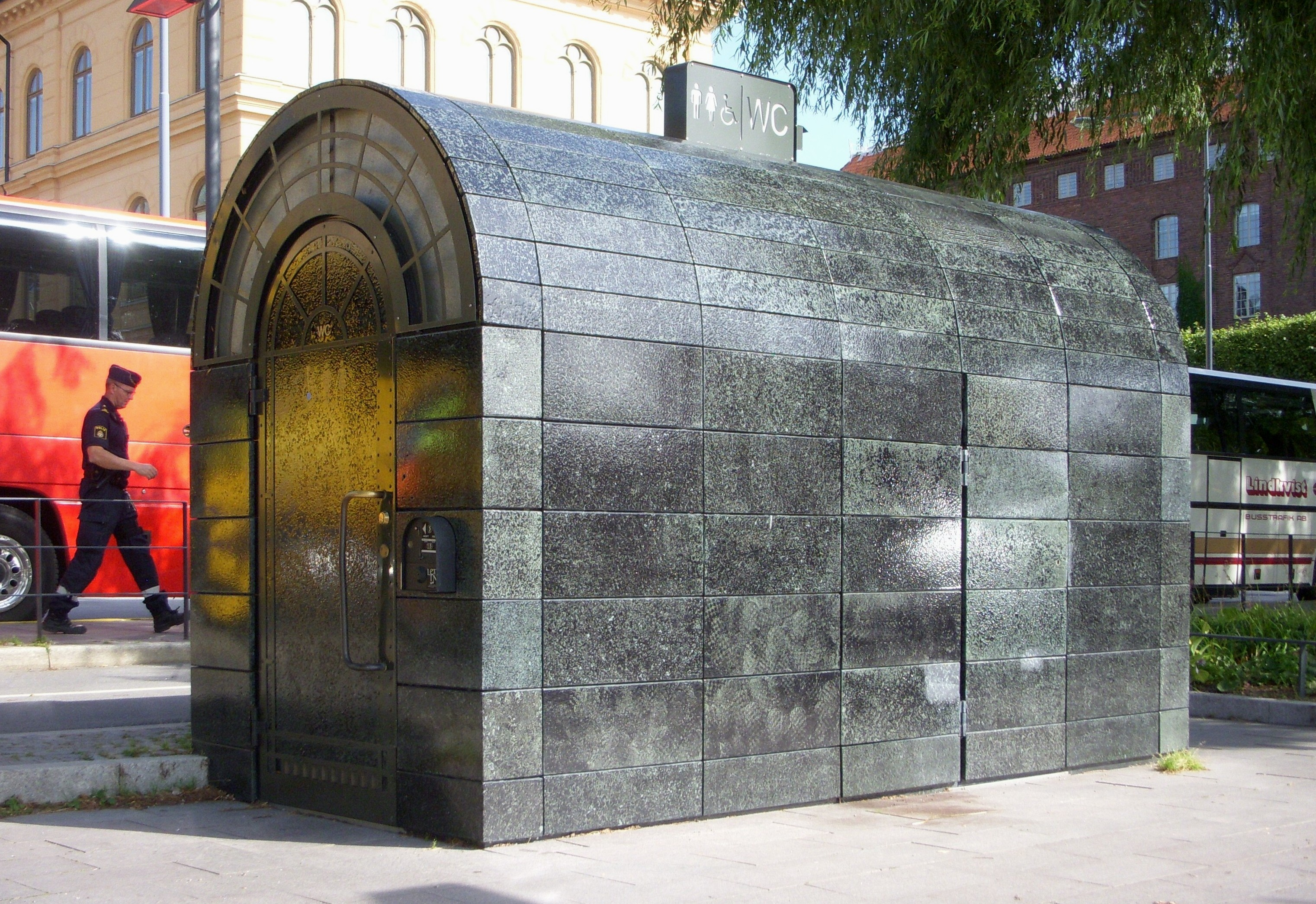 Stadstoaletten "Paragon" vid Norr Mälarstrand